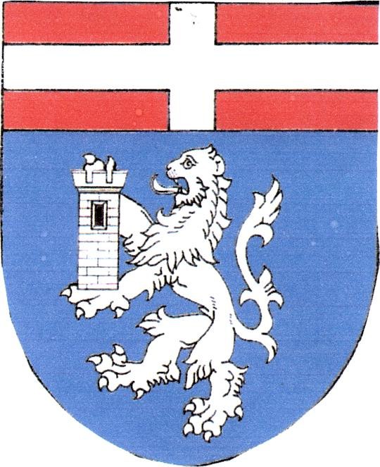 Znak obce Křižínkov